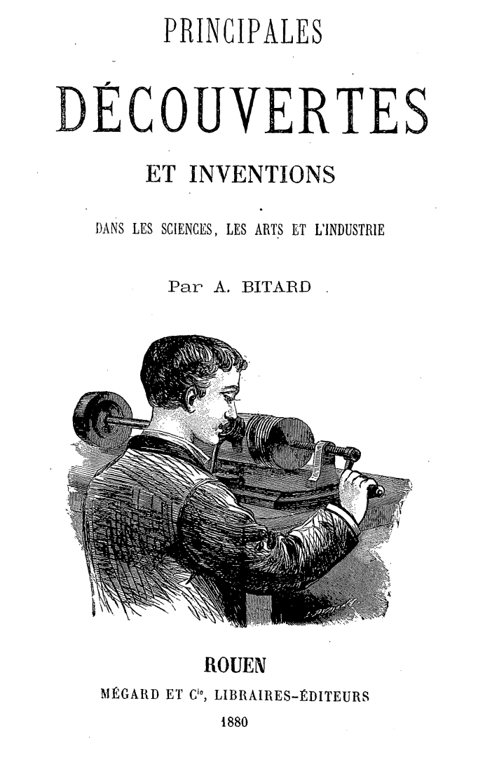 Frontispiece of Principales découvertes et inventions dans les sciences, les arts et l'industrie (1880) by French journalist and encyclopedist Adolphe Bitard (1826-19??) depicting an early phonograph.